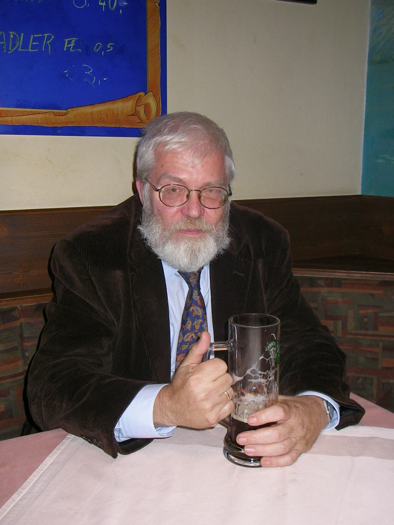 Picture of Horst Enzensberger, German Medievalist